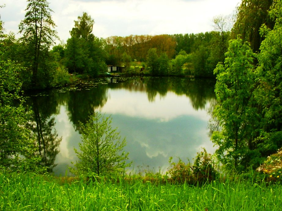 Vijver